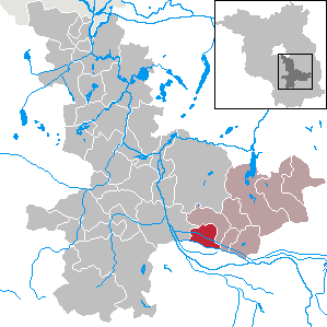 Alt Zauche-Wußwerk in Brandenburg (Country) - District Dahme-Spreewald